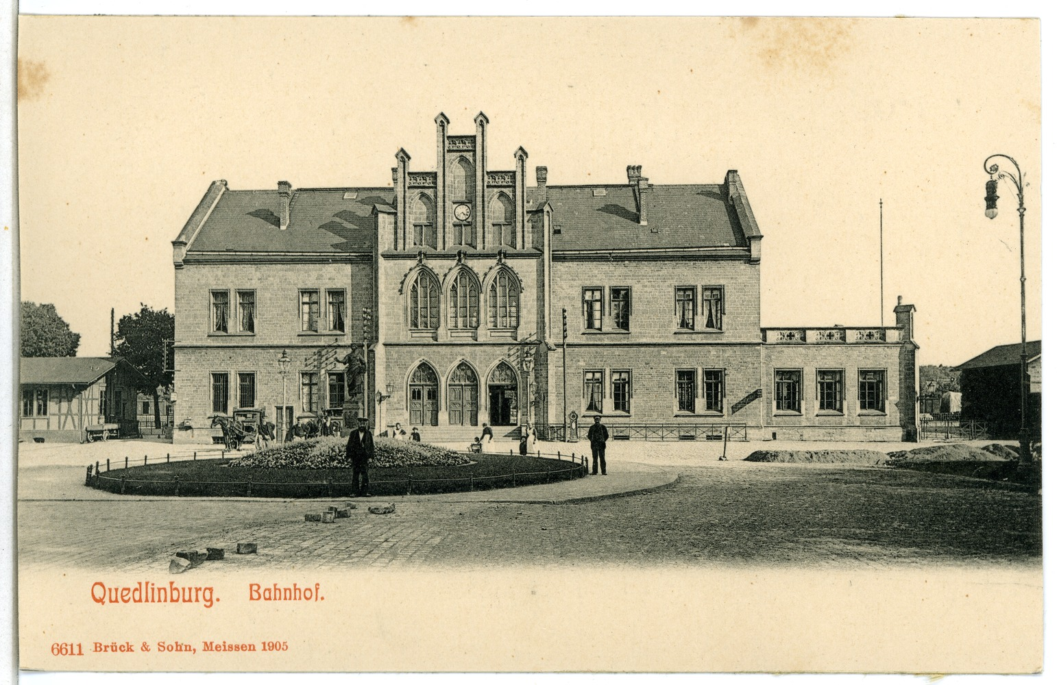 Quedlinburg; Bahnhof This postcard is from publisher Brück & Sohn in Meißen ( postcard has a unique number 06611 and is available in a higher resolution at the publisher. This images was uploaded in a cooperation project between Wikipedians and the publisher.